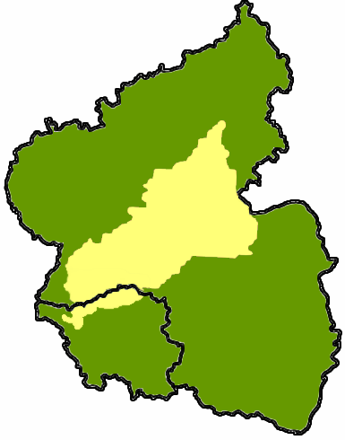 Lage des Hunsrücks in Rheinland-Pfalz und Saarland, selbst erstellt, gemeinfrei